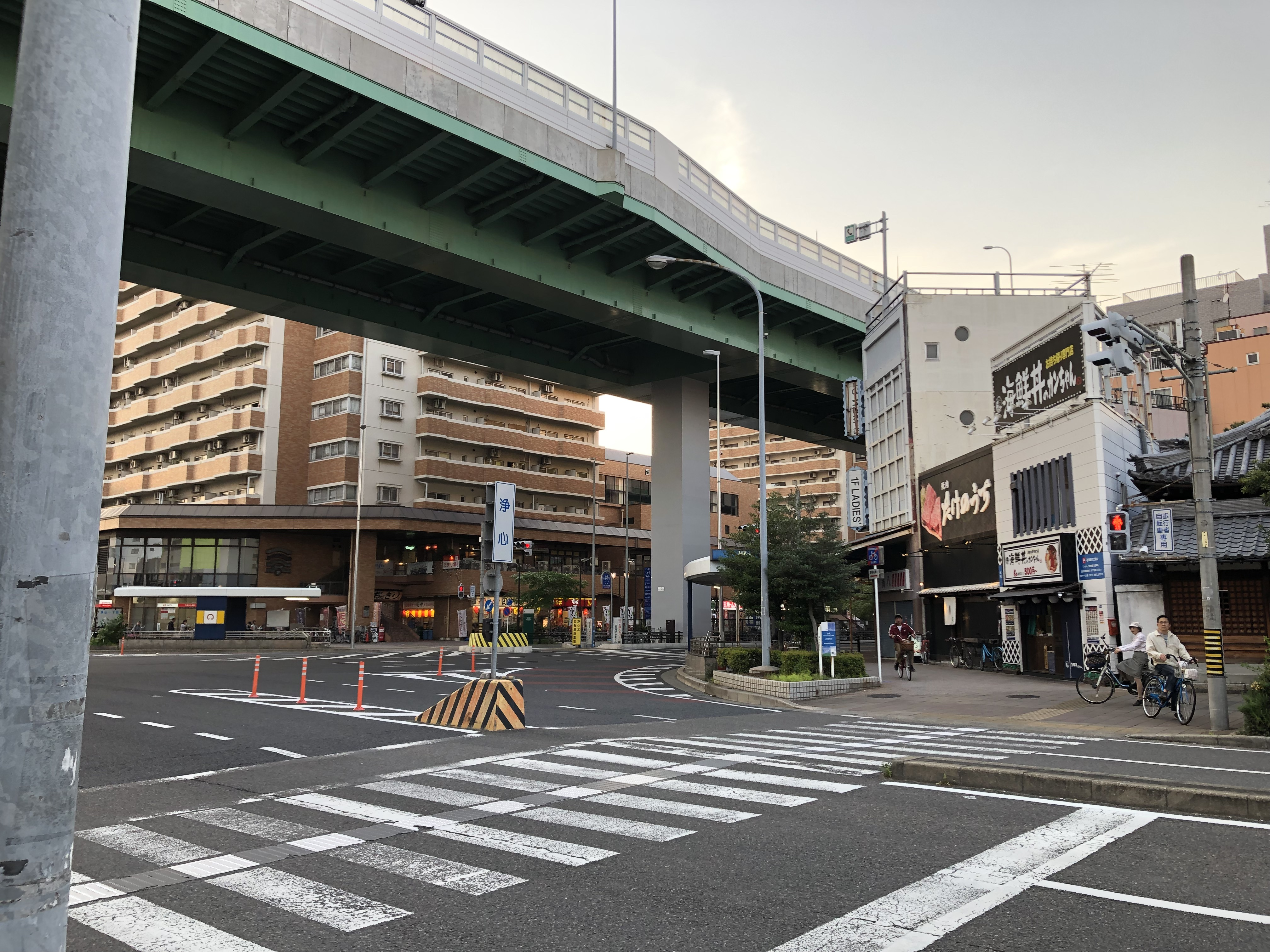 浄心交差点北